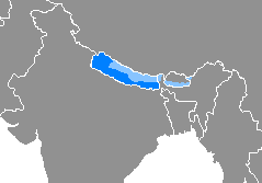 Donde es mayoritario Donde es minoritario